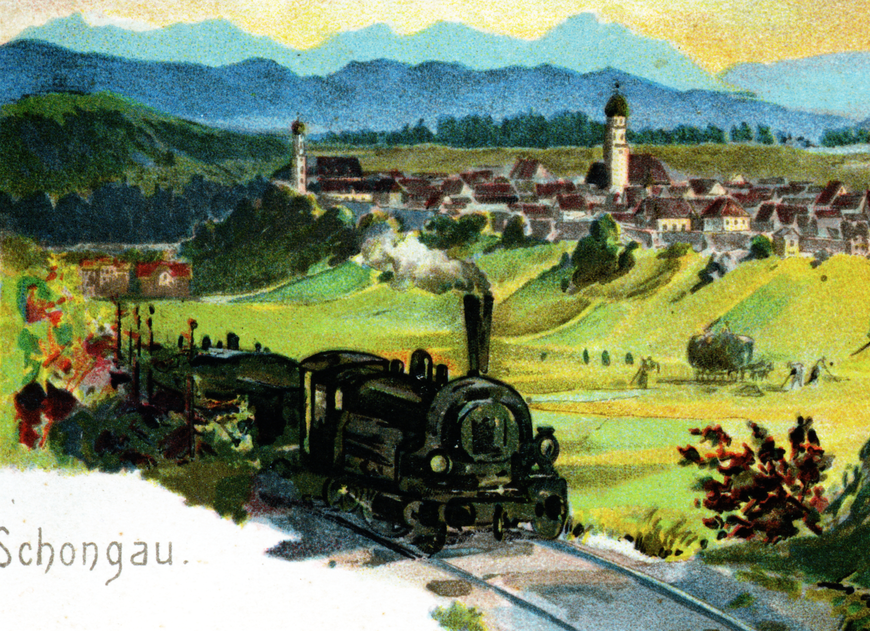 Schongau um 1900 von Norden, im Vordergrund die Bahnstrecke nach Landsberg am Lech. Detail einer Postkarte.